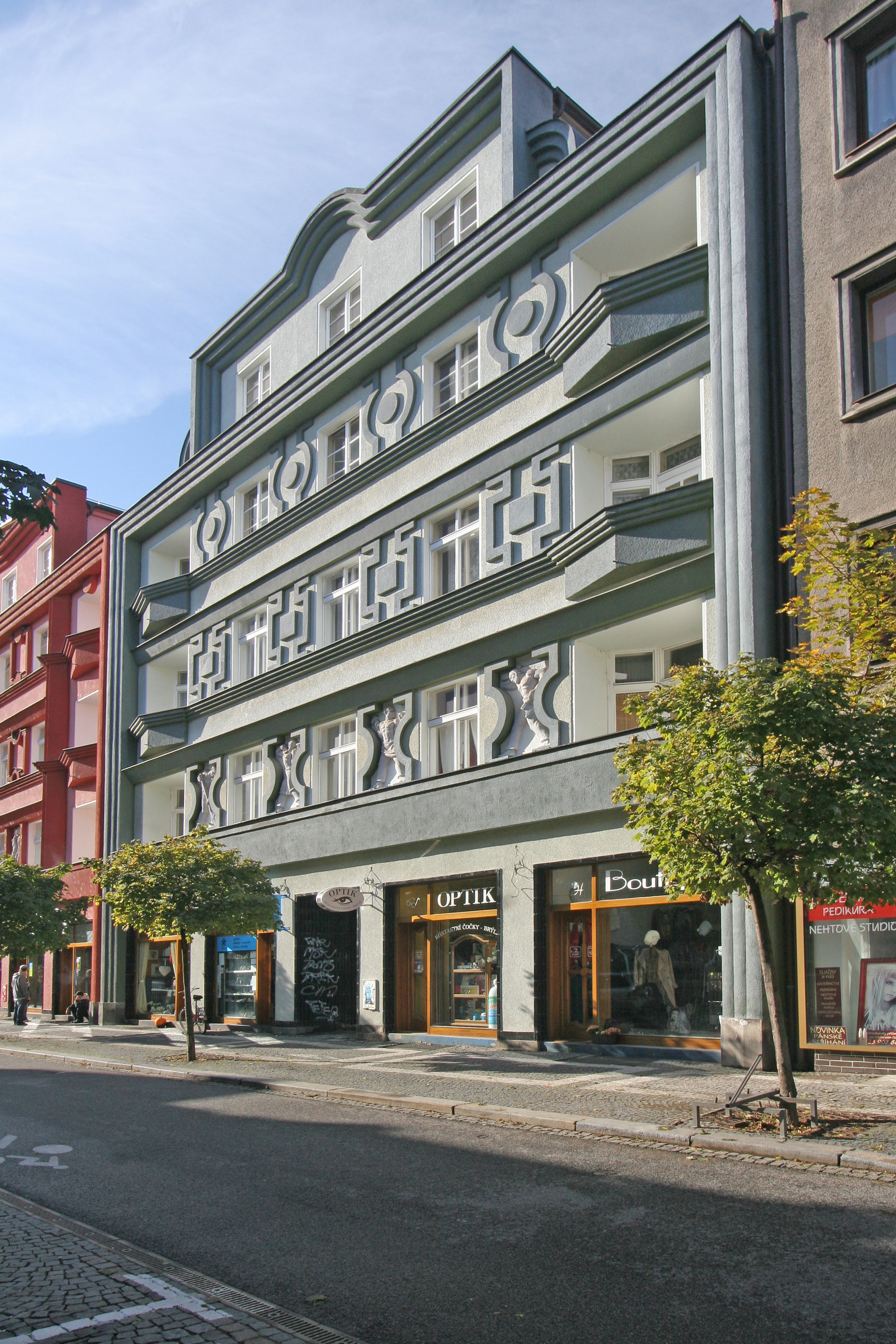 Měšťanský dům, Sladkovského 994, Pardubice